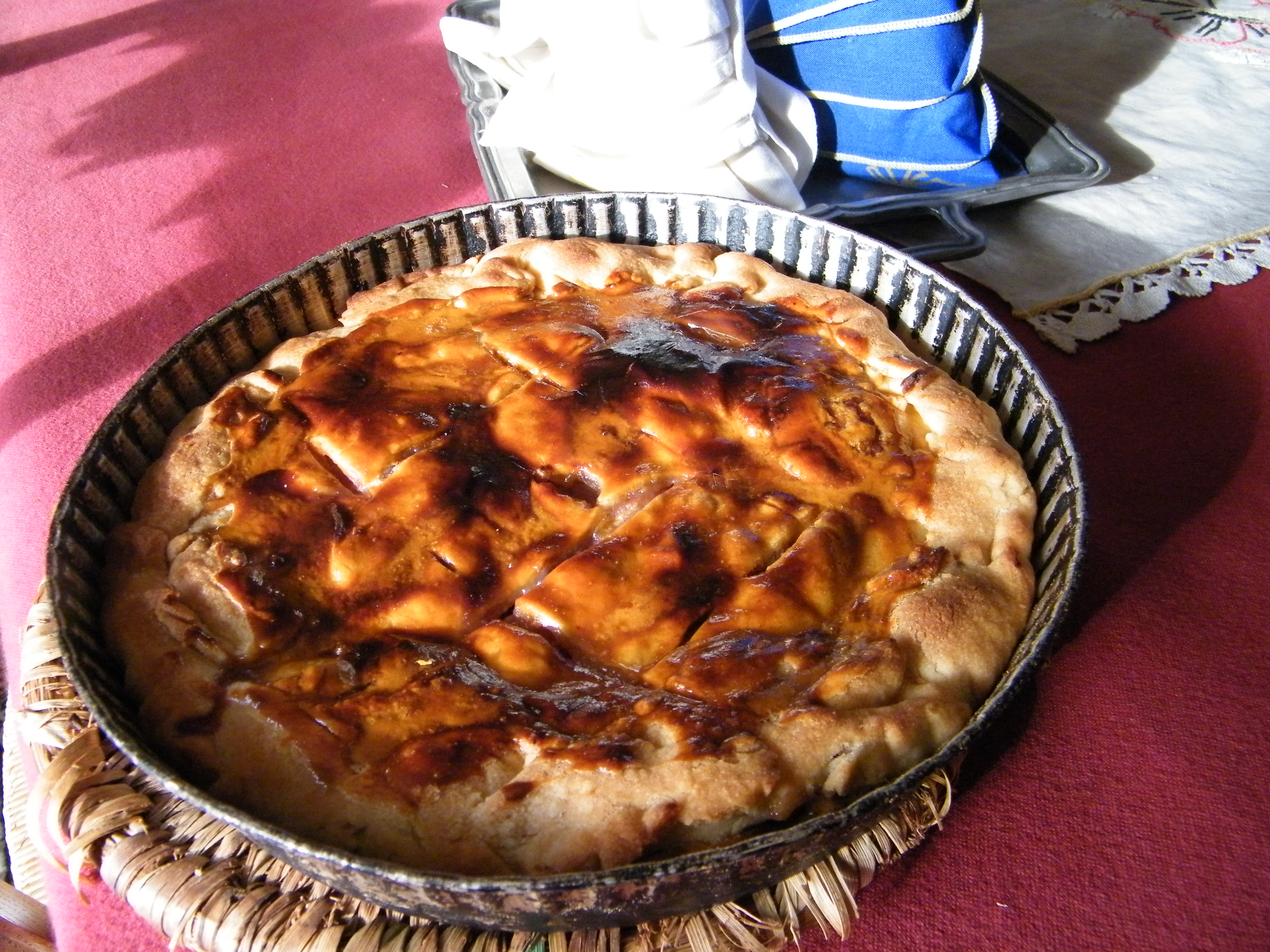 Pâté de poires de Fisée, spécialité picarde et normande.